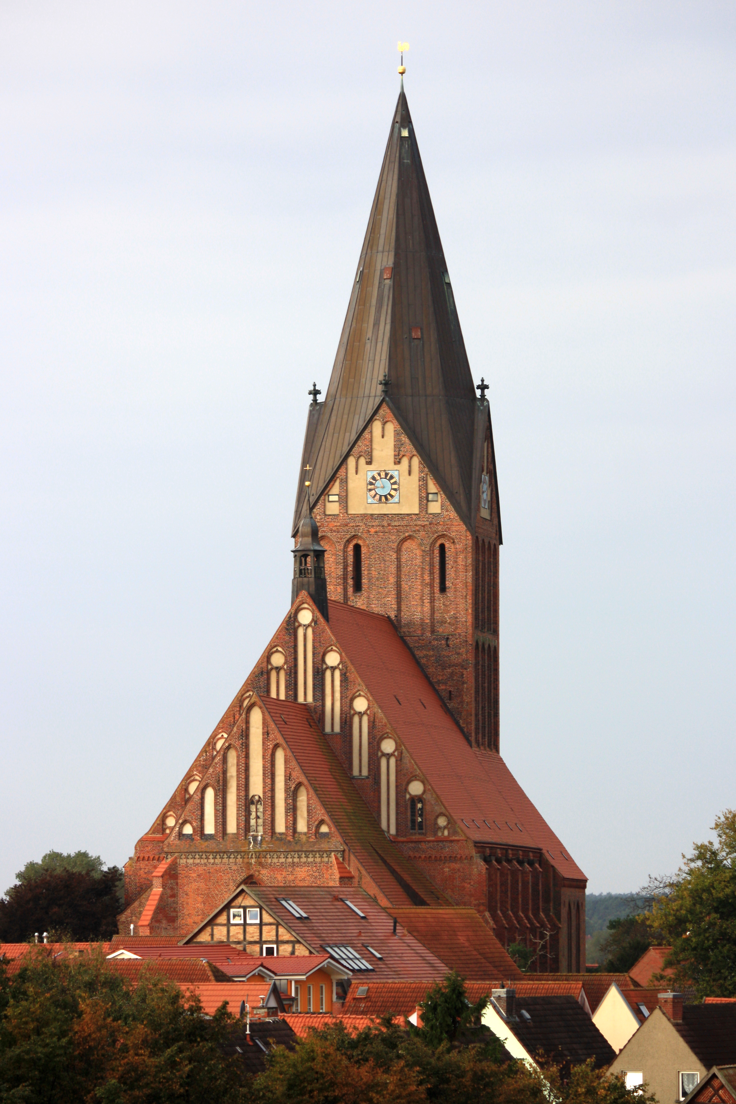 Die St.-Marien-Kirche in Barth aus Richtung Osten